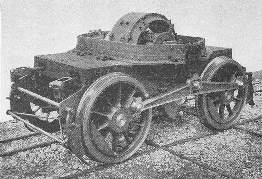 Versuchsbetrieb Seebach-Wettingen: Drehgestell der Lokomotiven Nr. 1 und 2 mit 250 PS-Motor